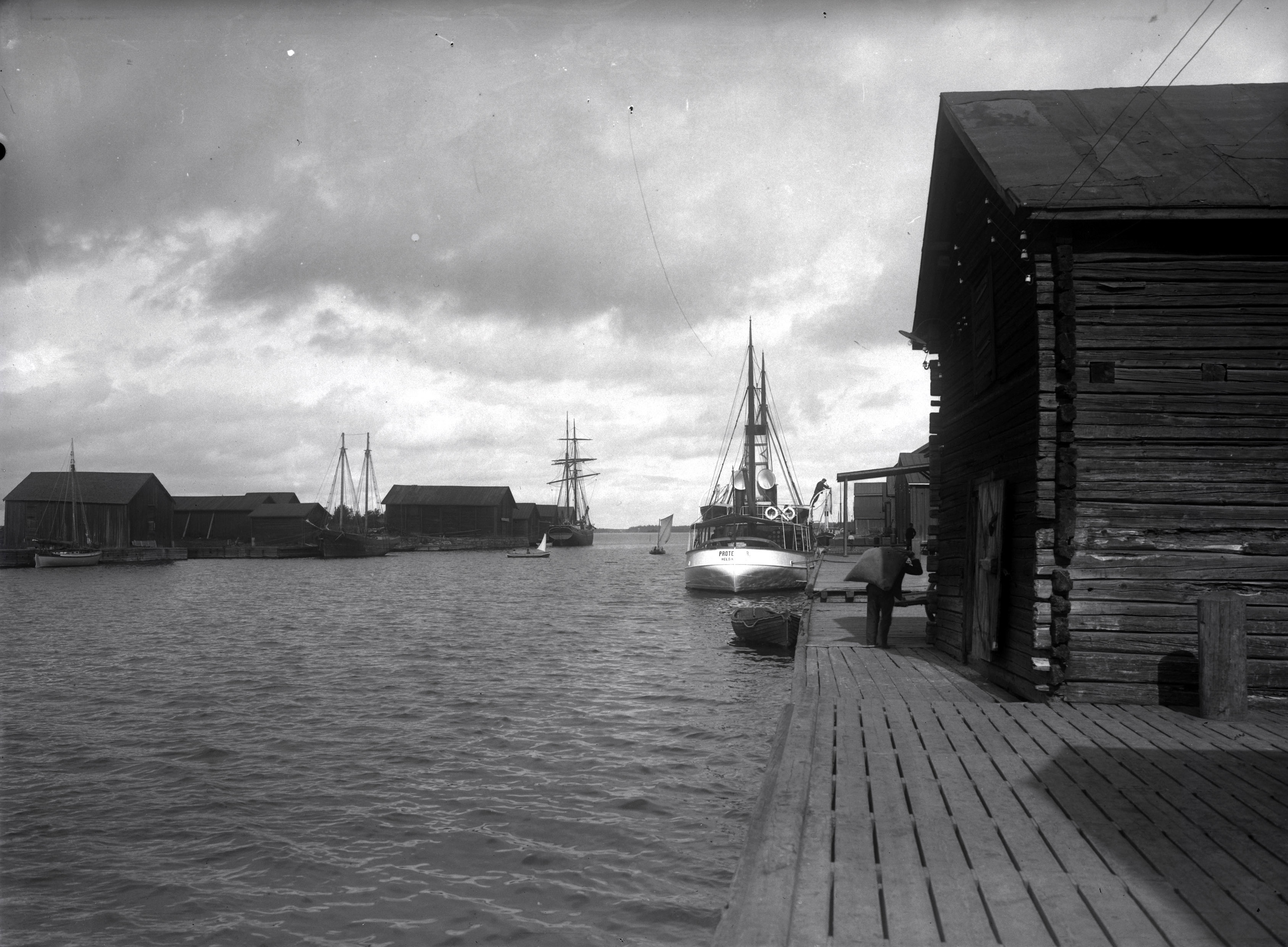 Vasa - Vaasa, ca. 1900-1910. Brändö strait with the rescue ship s/s Protector. By Alex Federley (1864-1932). Åbo Akademi Picture collections - Åbo Akademis Bildsamlingar - Åbo Akademin kuvakokoelmat 1959/400:103. Do you know anything about this picture? Leave a comment below, or .